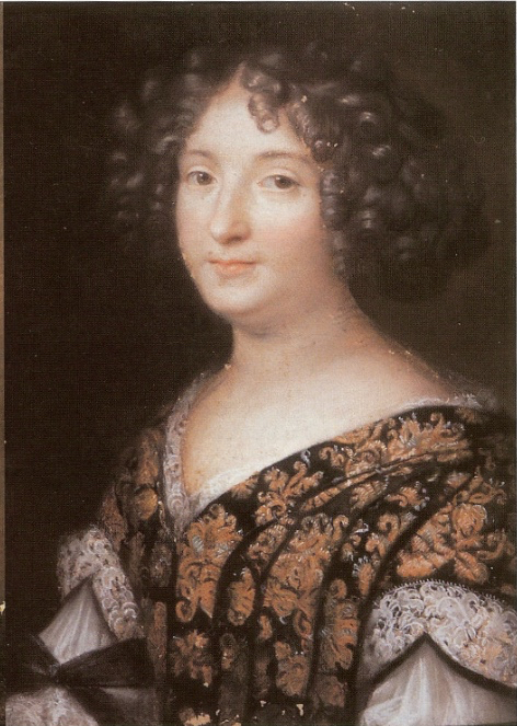 Charles Le Brun (1619-1690): Porträt der Henriette Sélincart